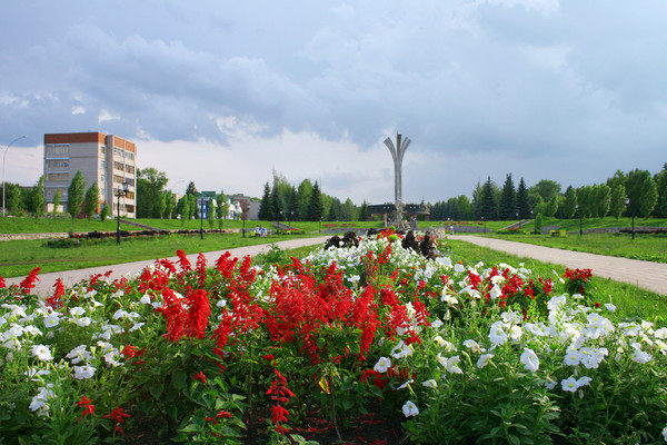 Вид на Проспект им. Ленина. Г. Лениногорск